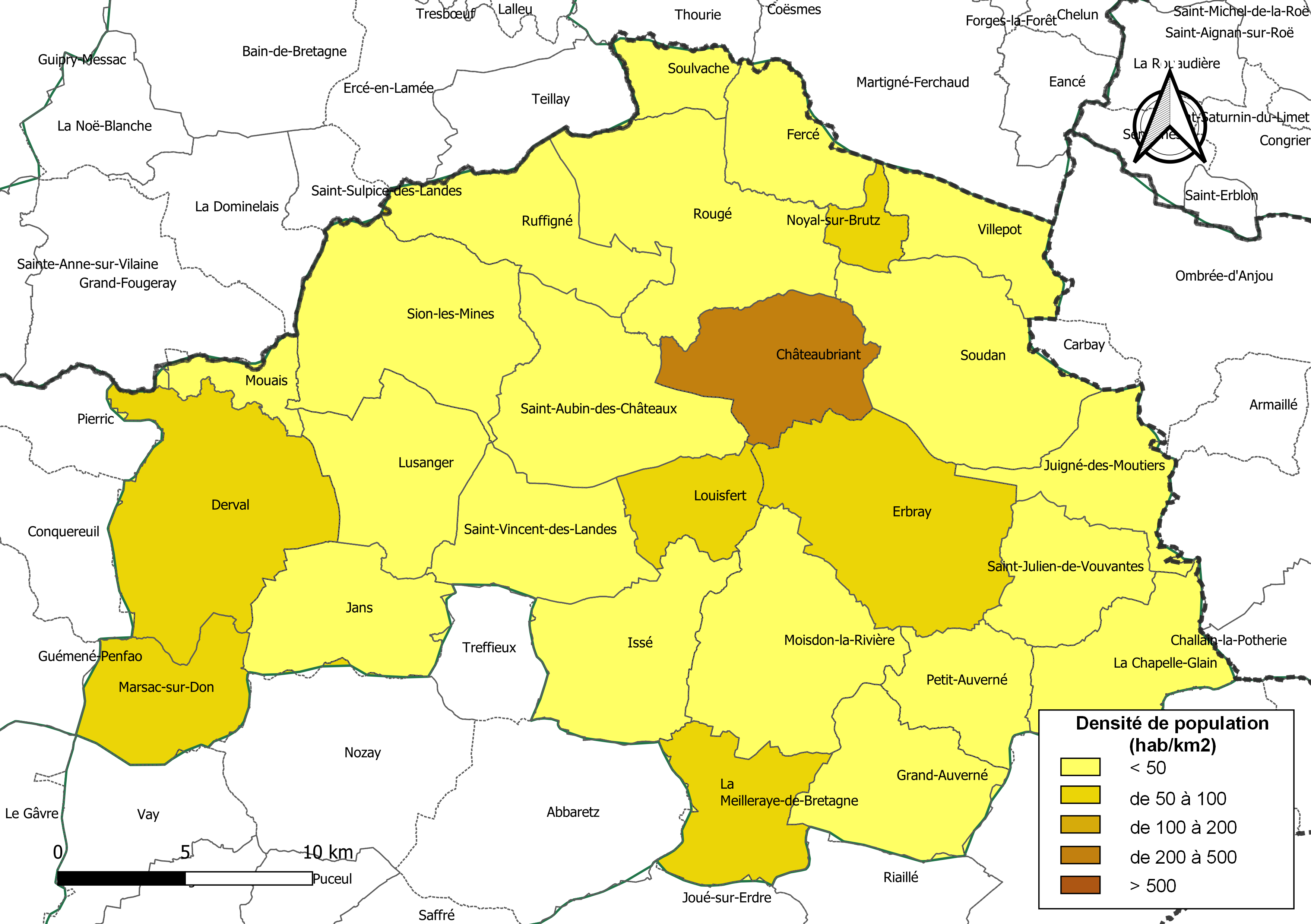 Carte des densités de population (millésimée 2016) des communes de la Communauté de communes Châteaubriant-Derval, département de la Loire-Atlantique, France. Composition au 1er janvier 2019.